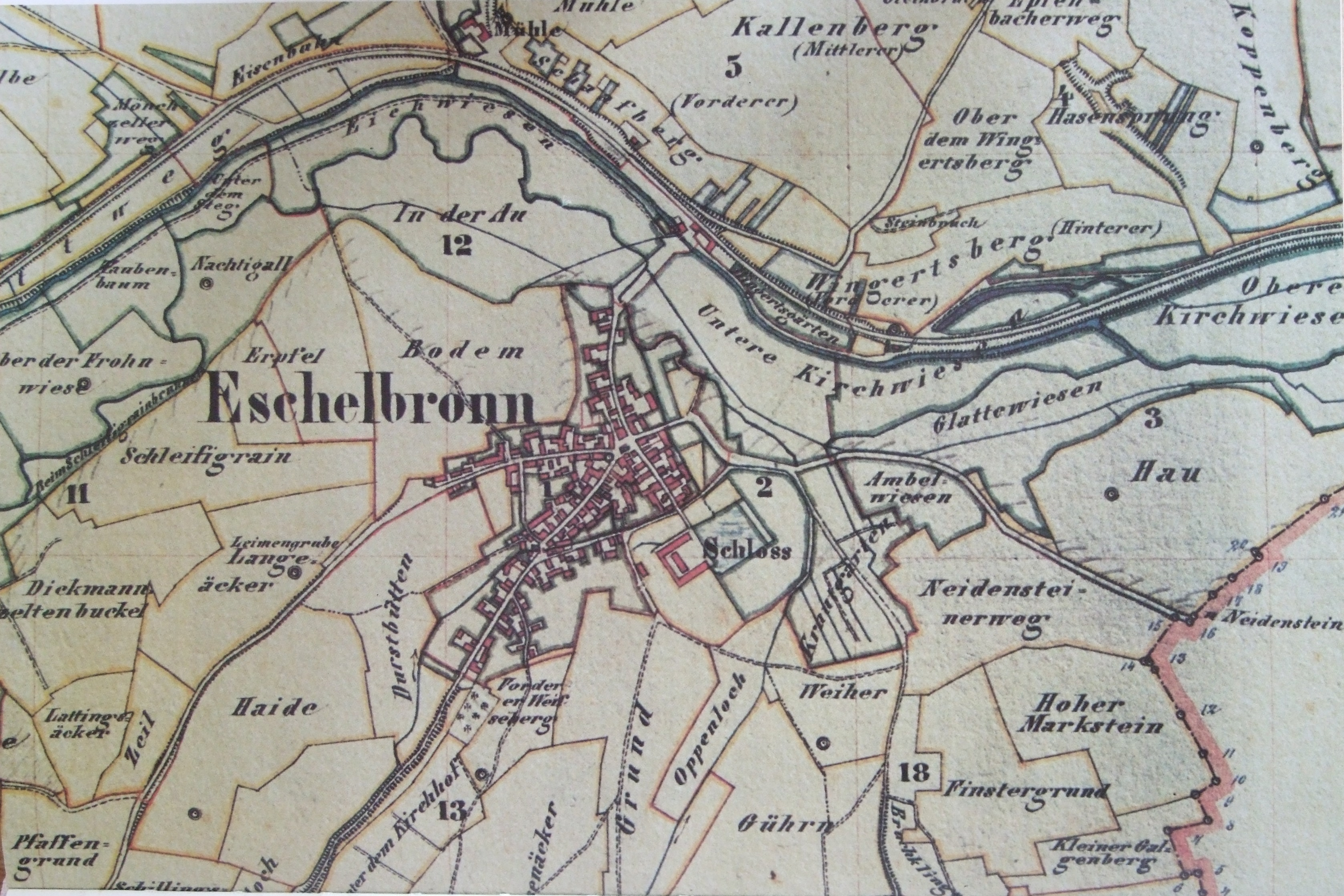 Ausschnitt einer alten Gemarkungs- und Wegekarte von Eschelbronn.